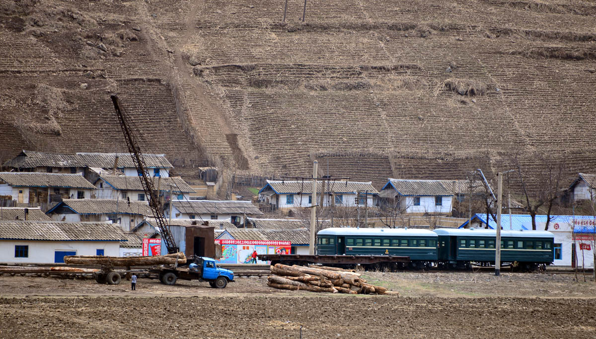 惠山满浦青年铁路 烟浦站 Pukpu Line (Hyesan Manpho Chongnyon Line) リムポ駅 (リムト駅) 림포역 (림토역) Rimpo (Rimto)